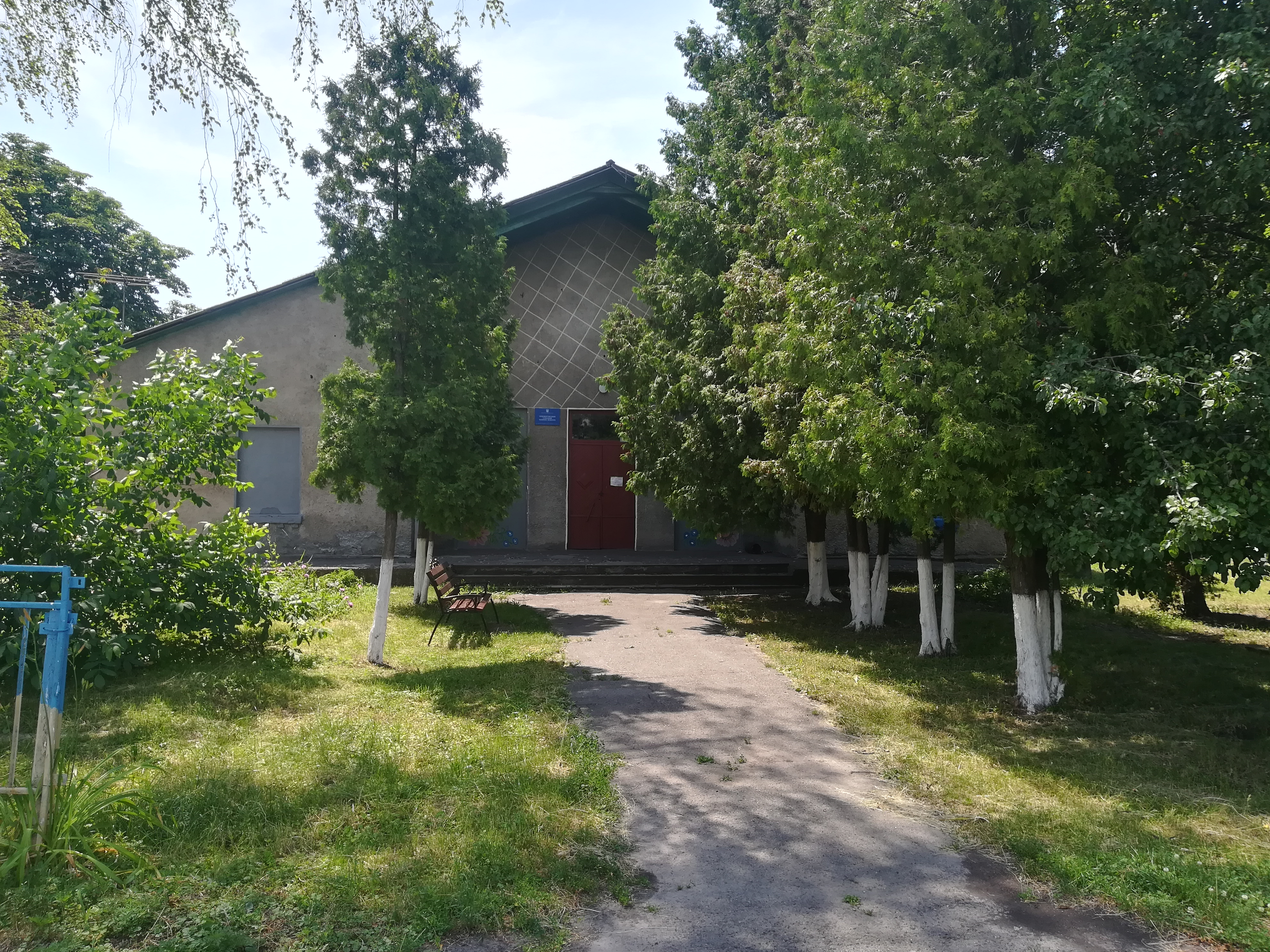 Сільський будинок культури